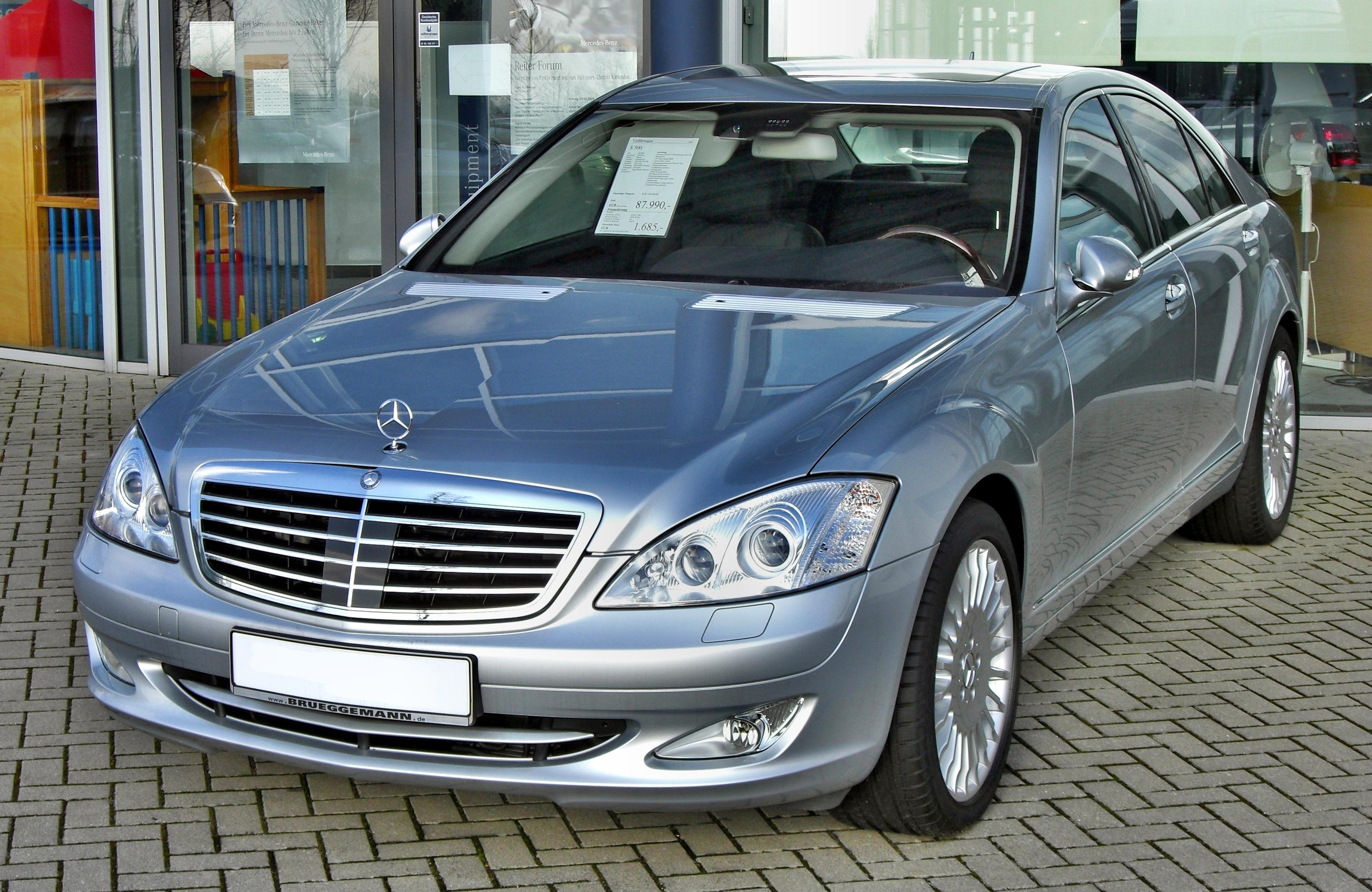 Mercedes S 500